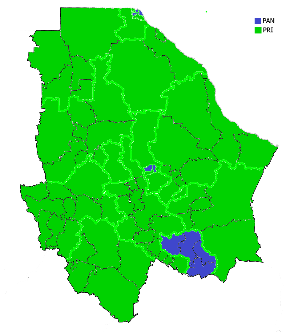 Diputados locales electos en el Estado de Chihuahua en 1998 por partido.